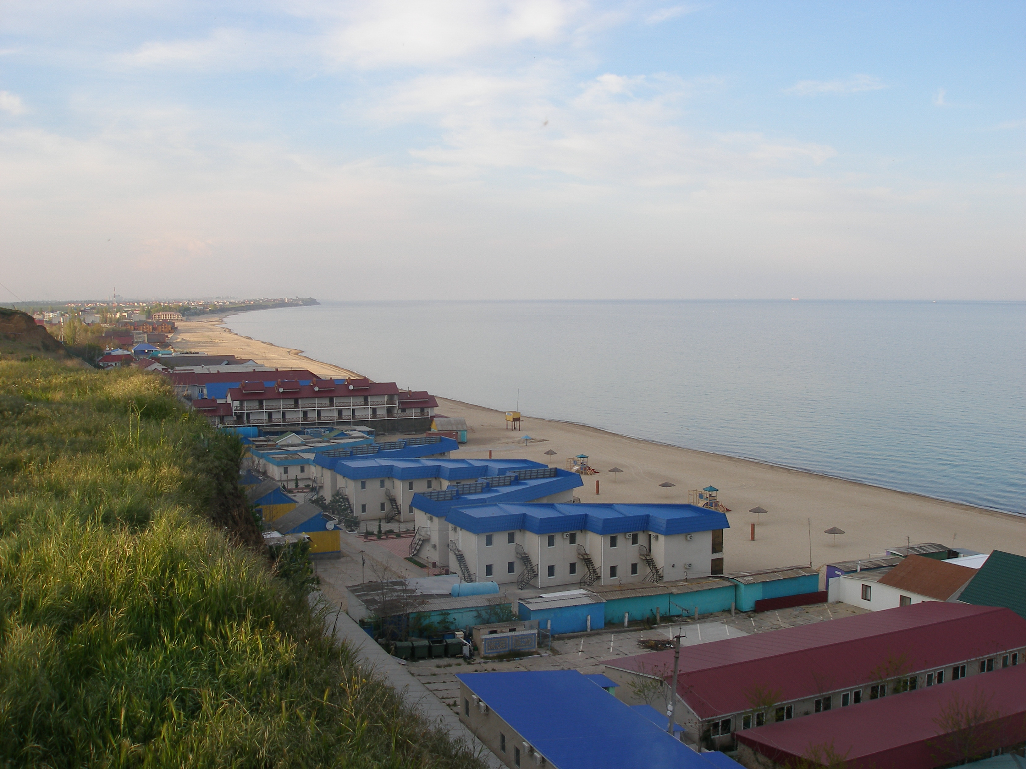 Gribovka beach